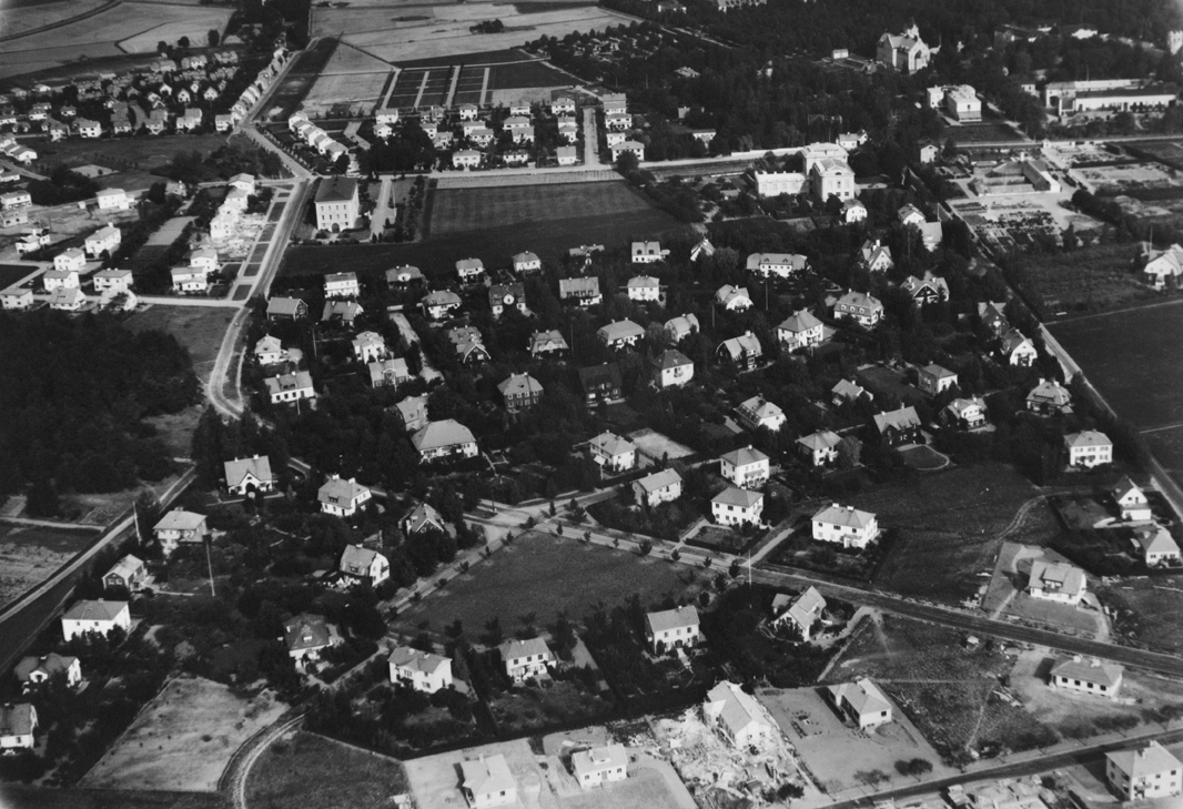 photos, uppsala, sweden